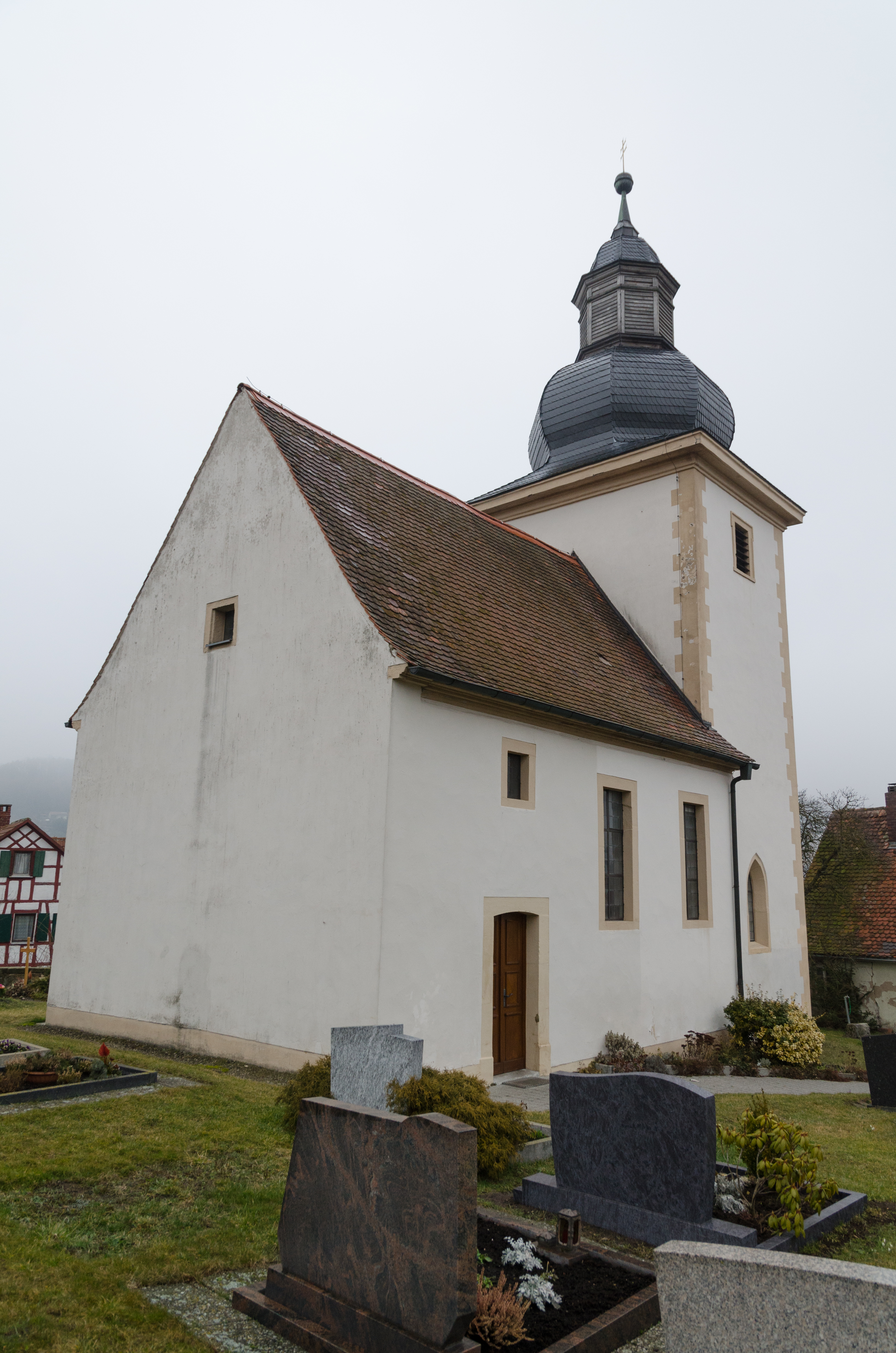 Bellershausen, Kirche